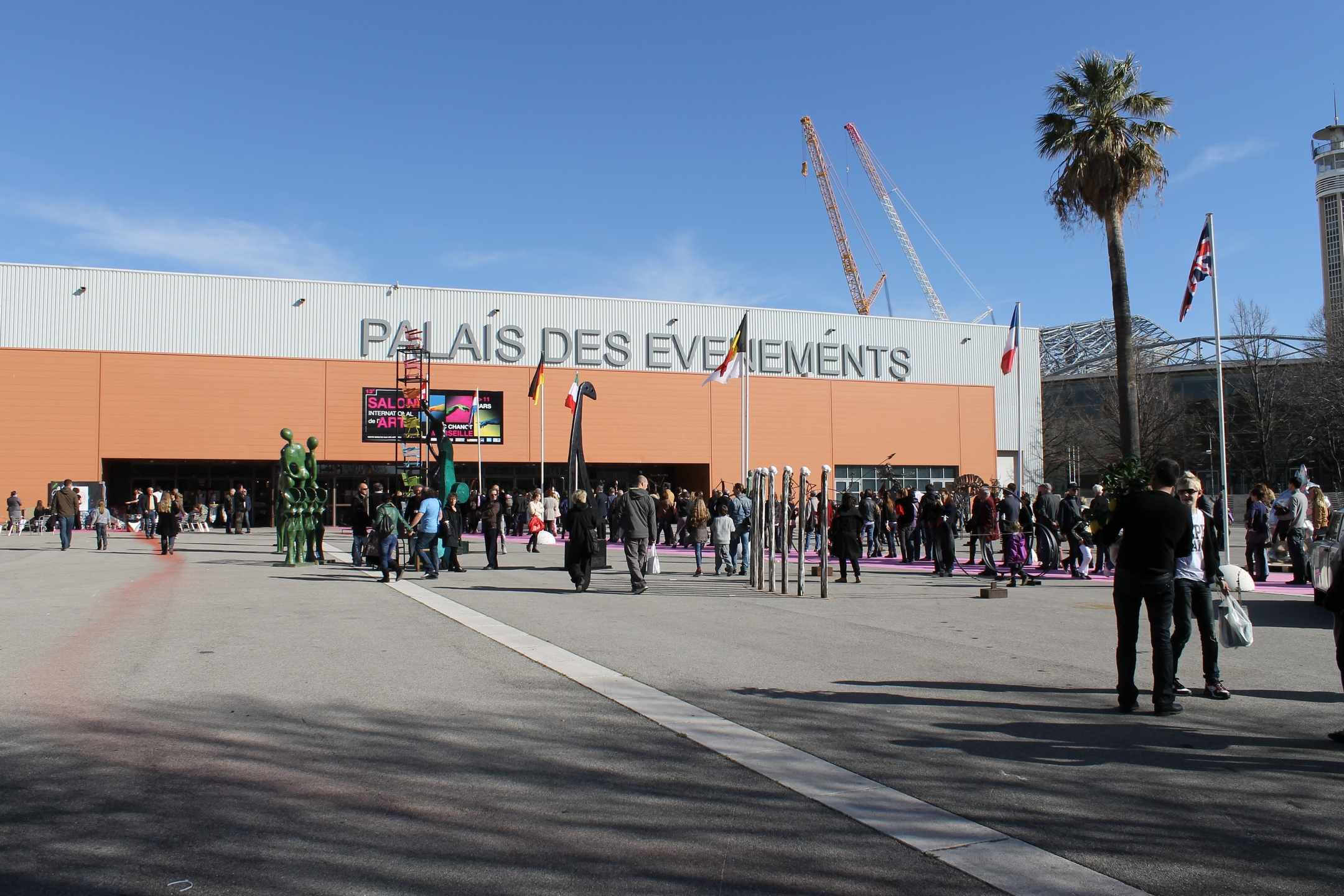 Entrée du SIAC - Palais des évènements